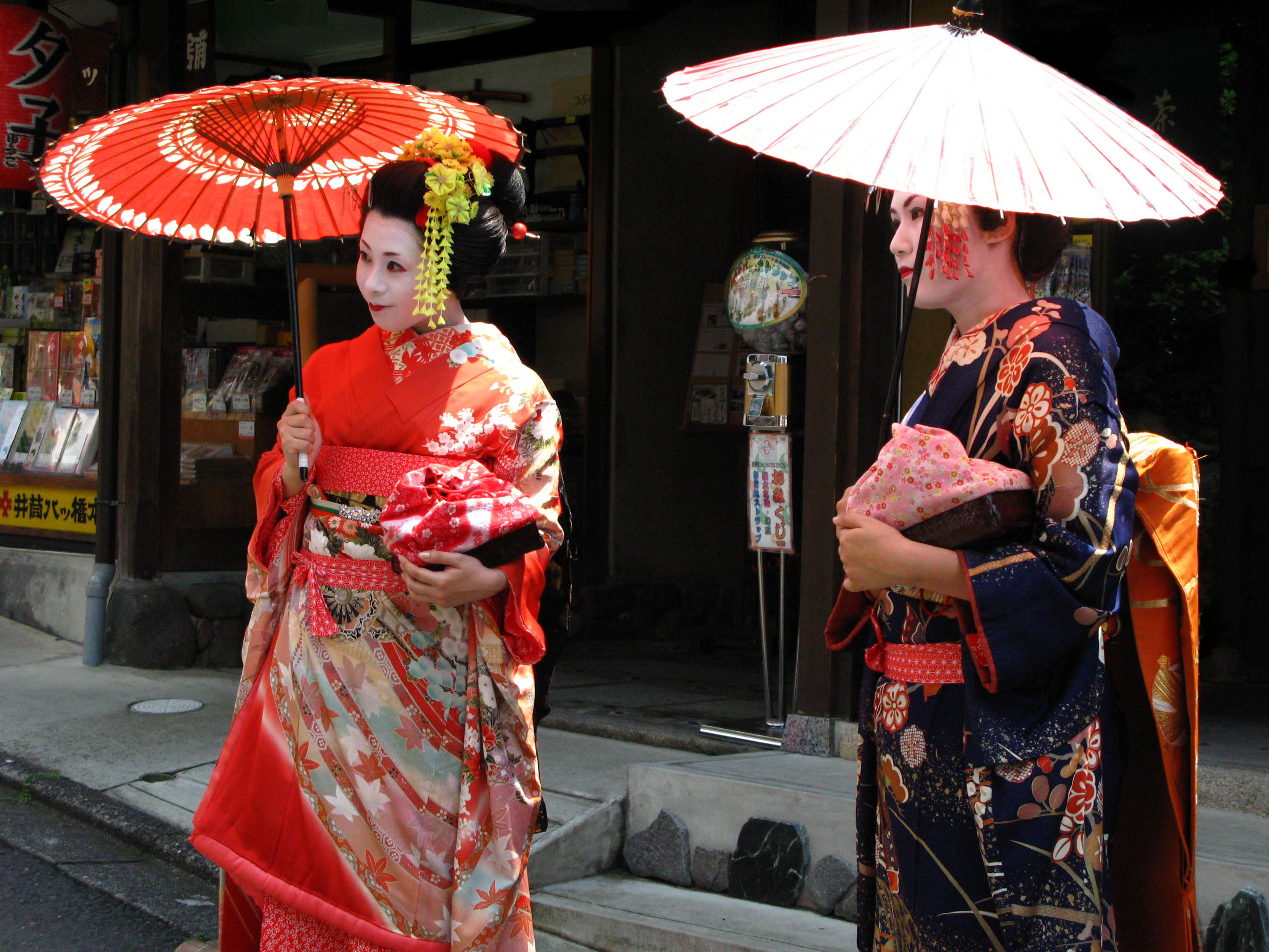 Tourists as fake Maikos